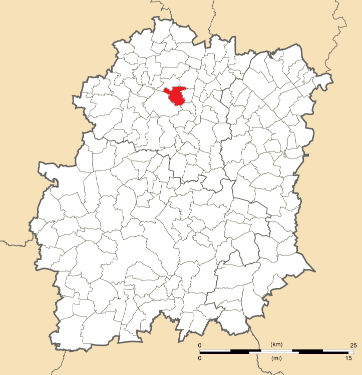 Carte de position de Nozay en Essonne (91)